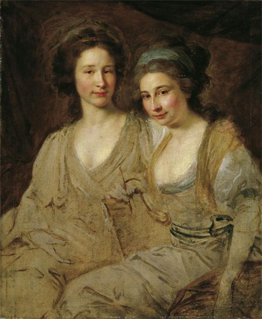 “Ritratto di due dame di casa Tomatis” (1788-1789), olio su tela, cm 98 × 80 Vienna, Osterreichische Galerie Belvedere, inv. 2427